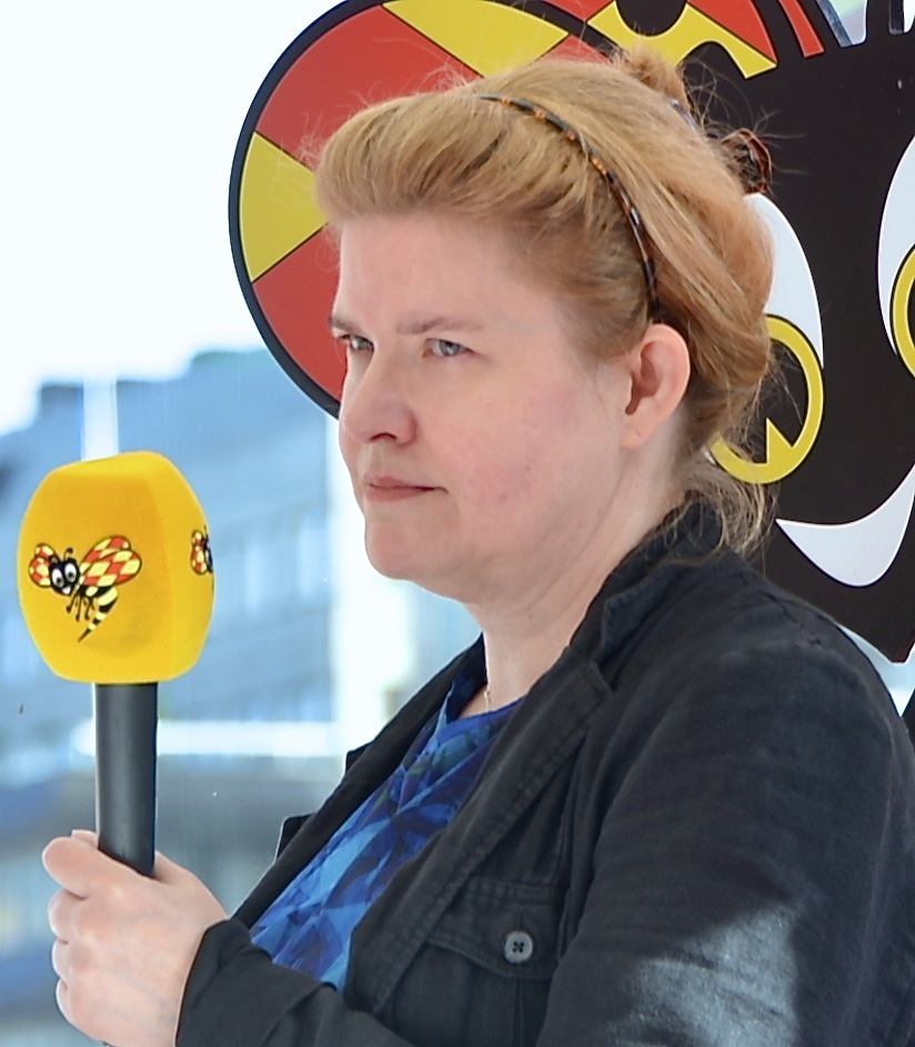 Ann-Charlotte Marteus på Expressens valscen på Sergels torg i Stockholm den 6 september 2014.